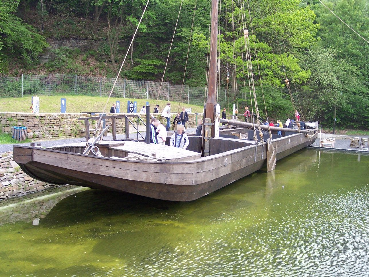 Witten, Industriemuseum Zeche Nachtigall - nachgebautes Ruhrschiff, Ruhraak, auf extra dafür geschaffener Wasserfläche